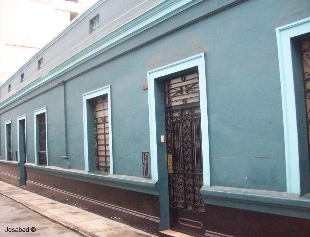 Pasaje Lumbreras en el distrito de Breña.